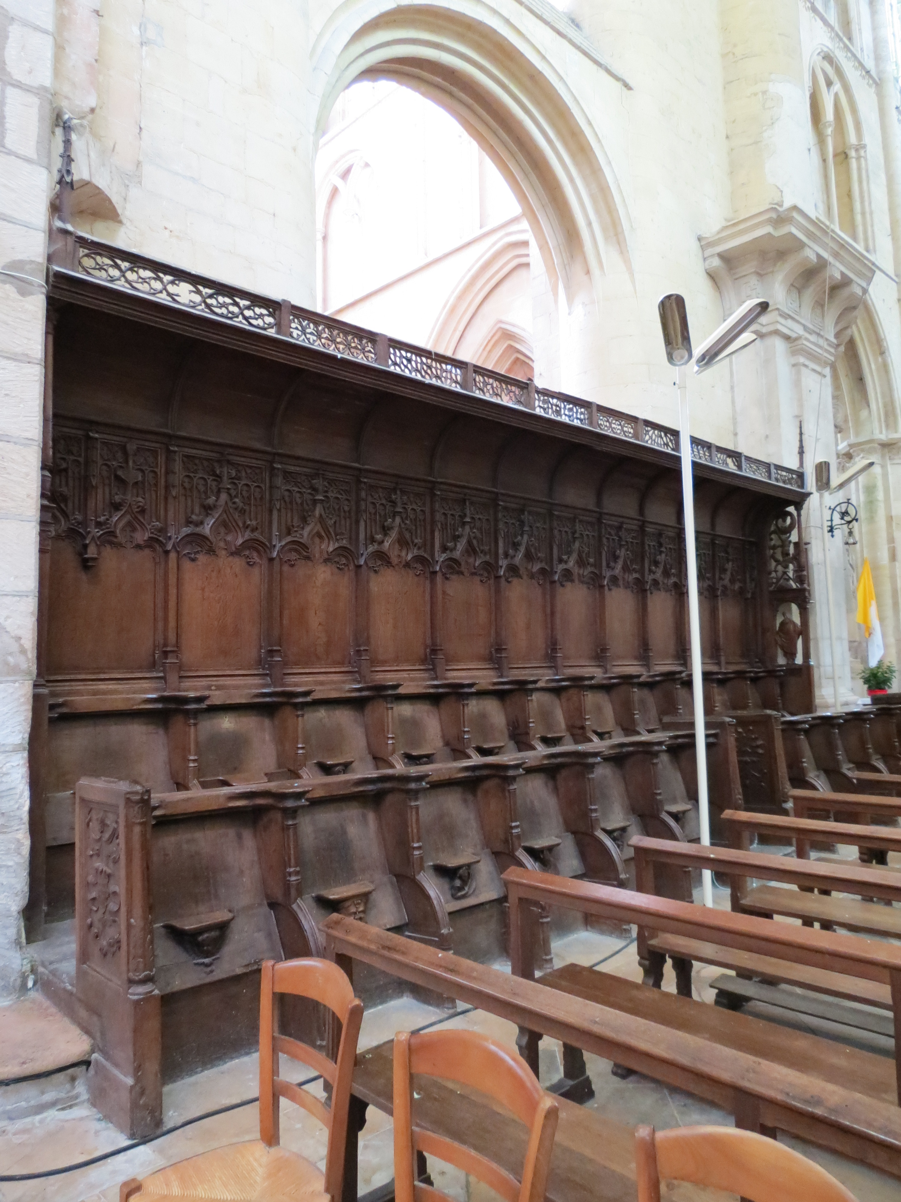 Stalles de Saint-Pierre-sur-Dives.